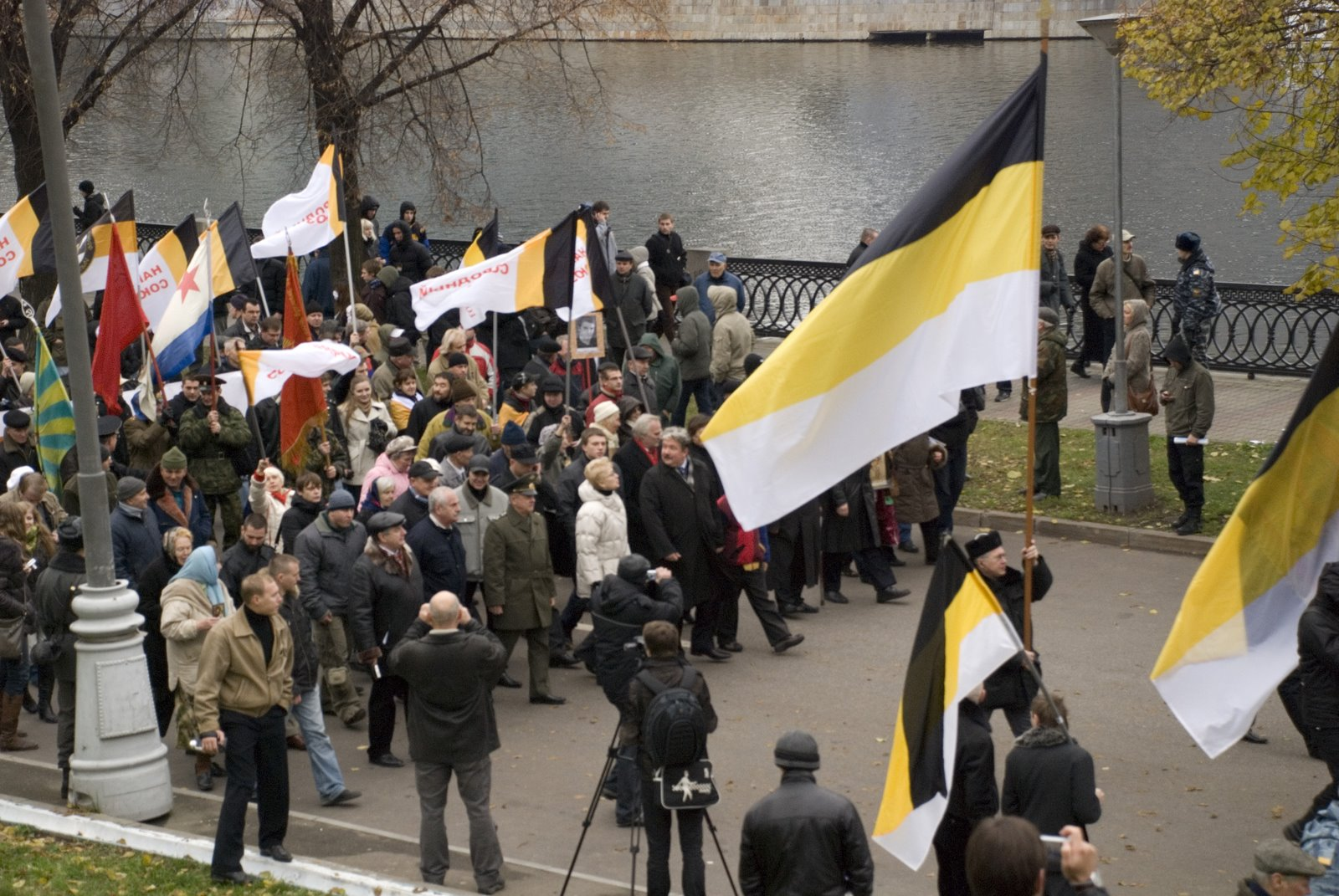 демонстрация русских националистов